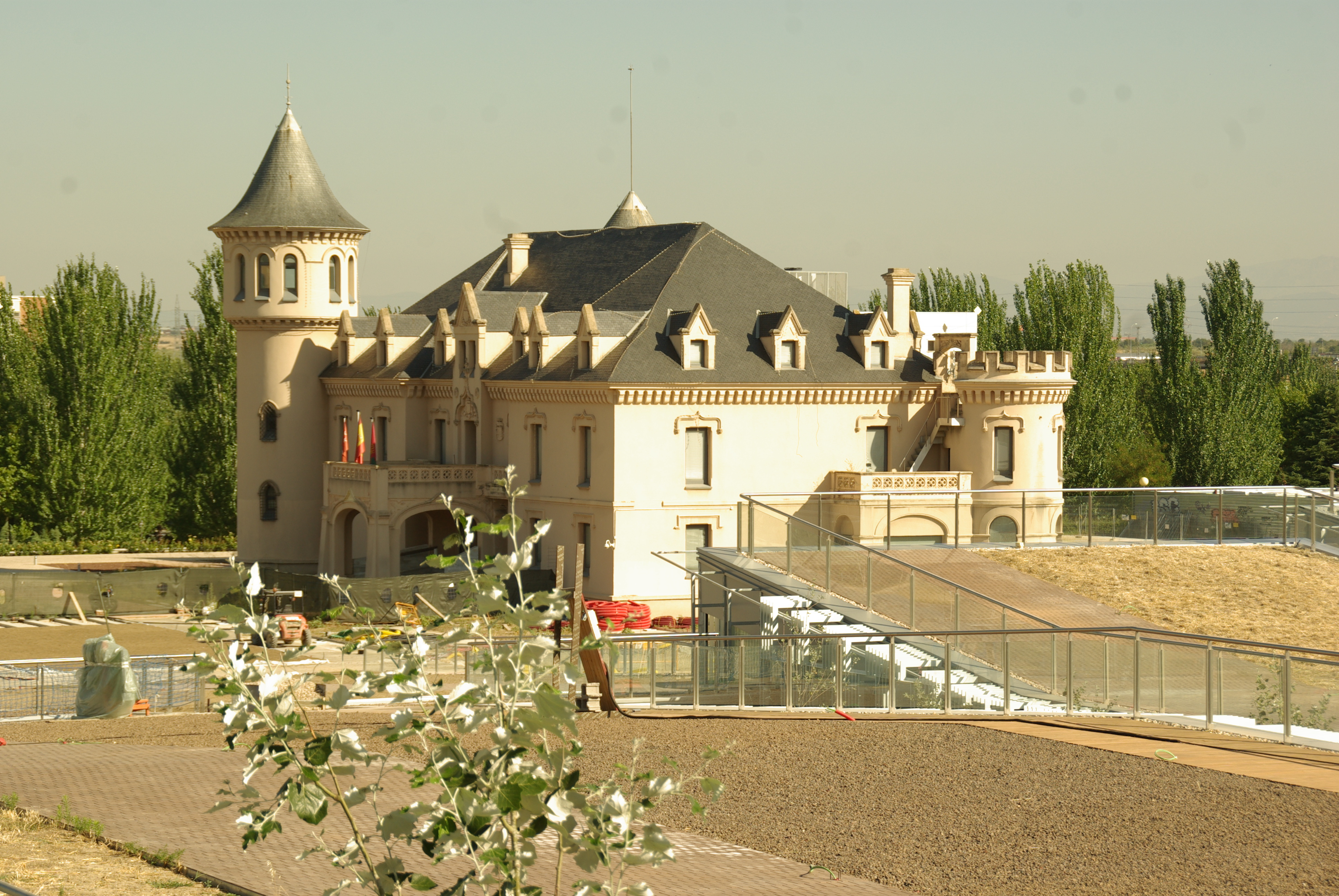 ® S.D. ALCORCON E.U.S. ARTECTURA PALACIO MARQUES DE VALDERAS